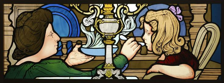 La becquée